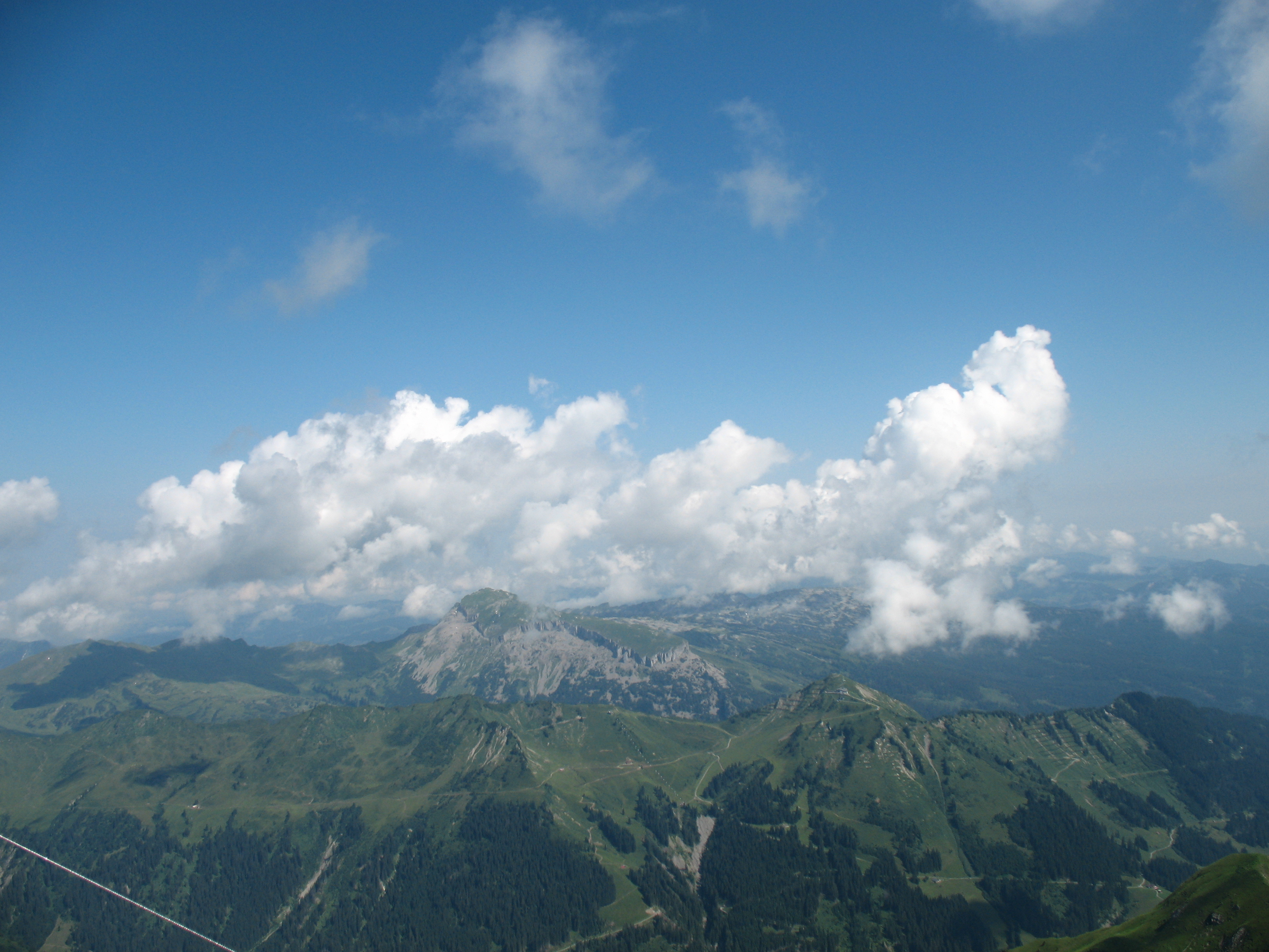 Der Hohe Ifen (2230 m) vom Großen Widderstein (2533 m) aus gesehen.